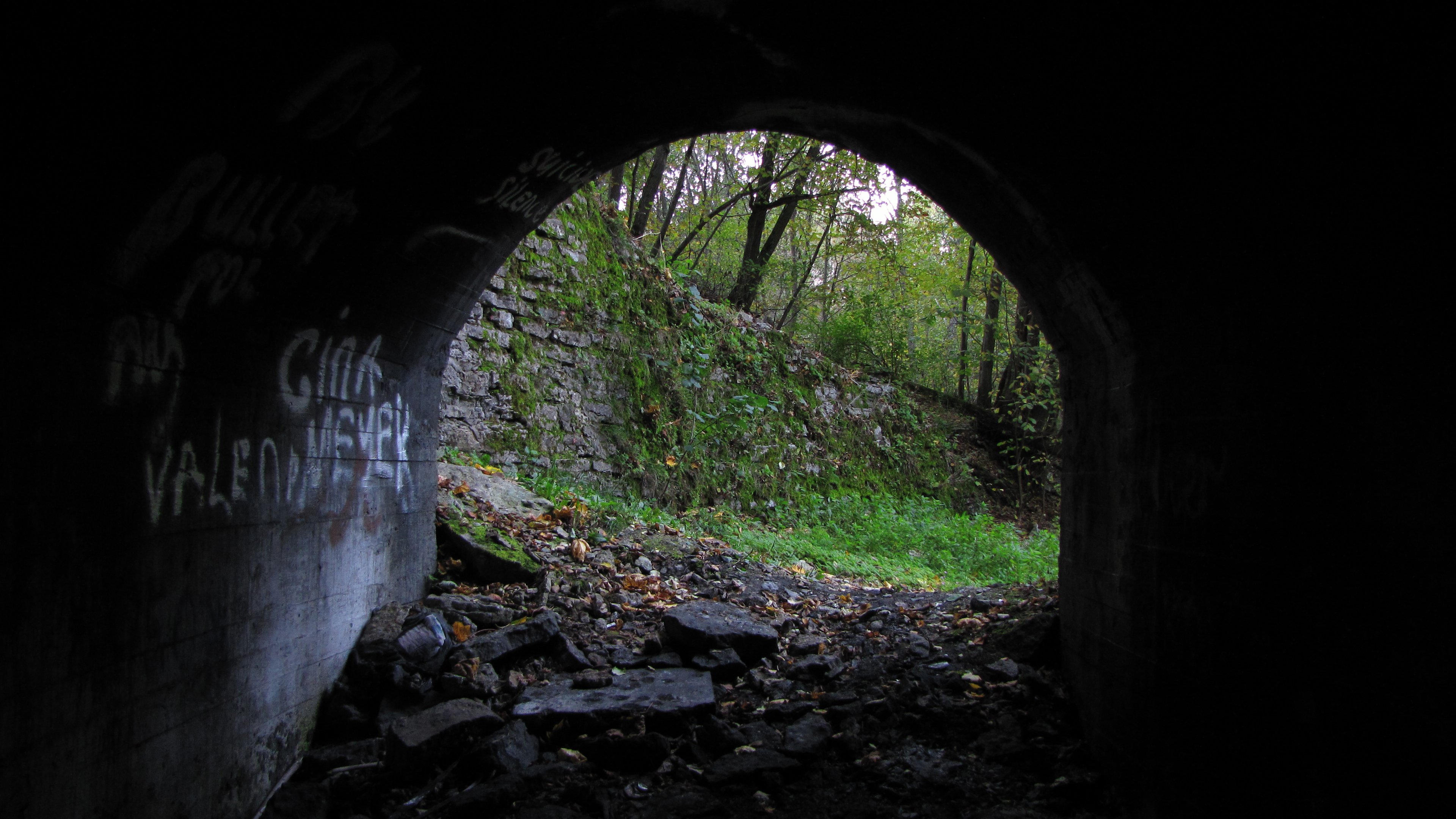 Peeter Suure merekindluse laskemoonalaod (ladu III), 1917. a., Astangu